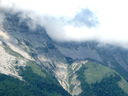 Epaulement sur une arête dominant Gresse-en-Vercors (France)